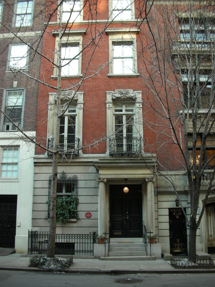 Ultima casa di Andy Warhol. Fotografia di Giuseppe Mastromatteo. New York, marzo 2007